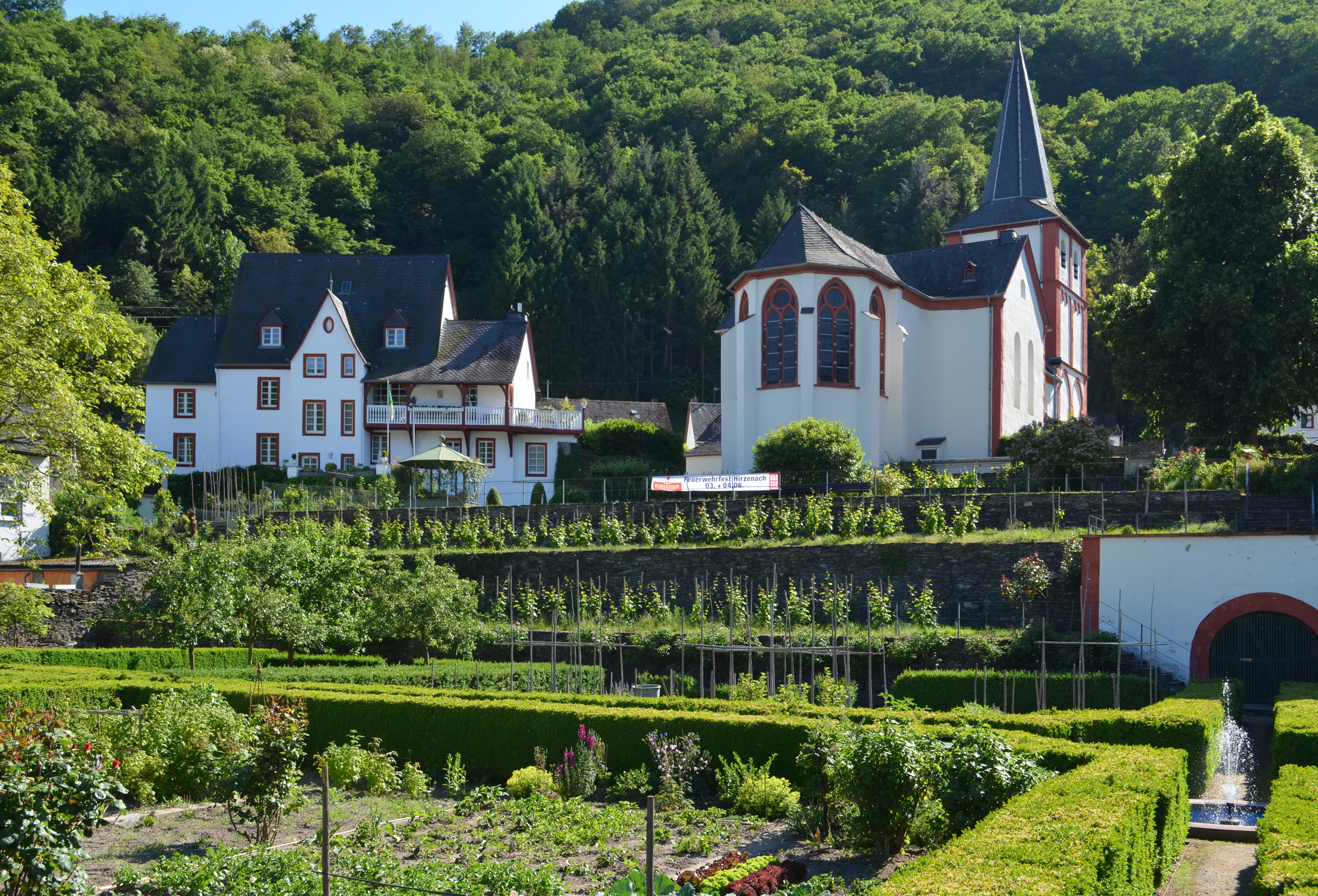 Villa Brosius und St. Bartholomäus in Hirzenach